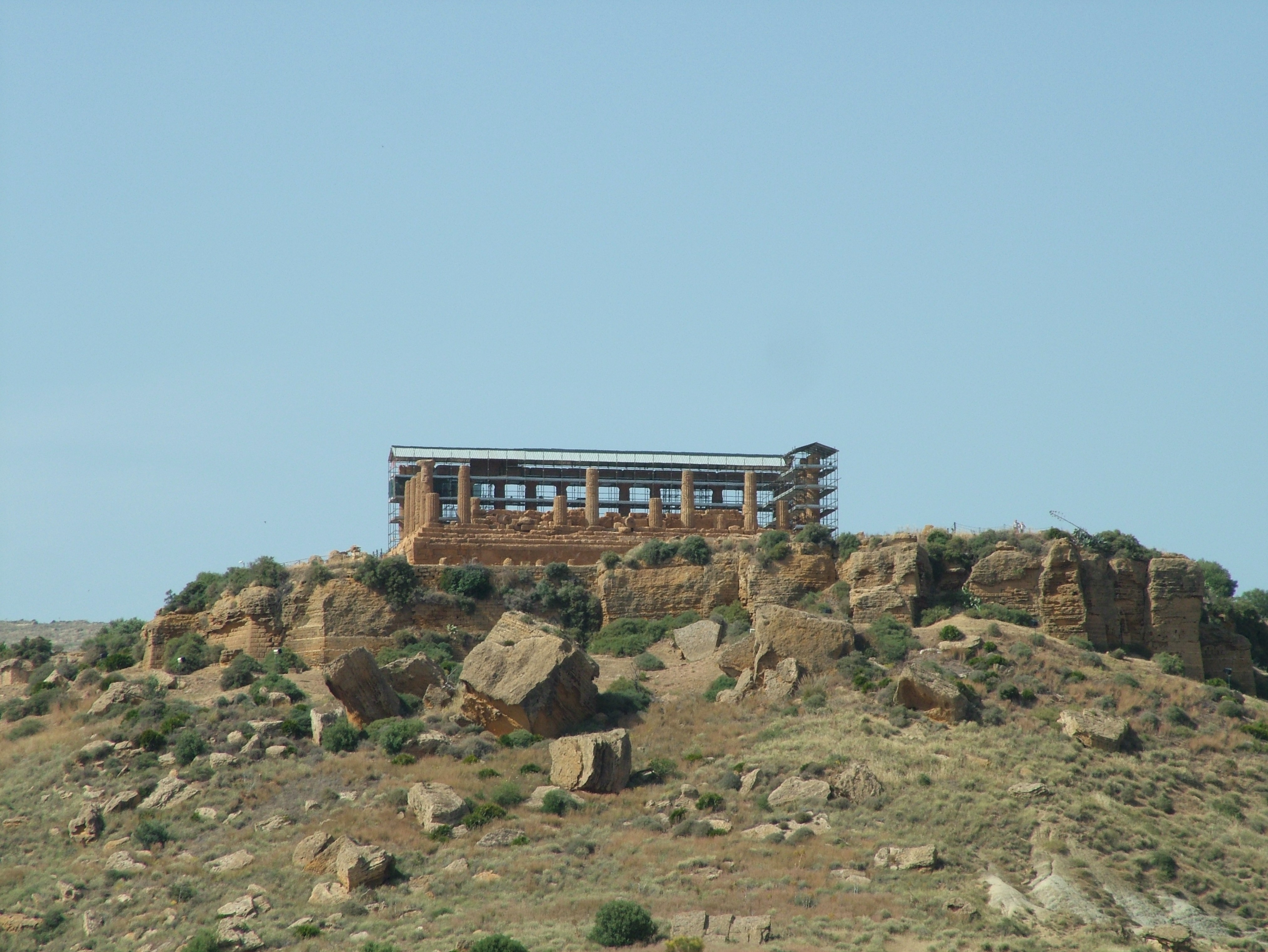 Agrigent, Tempel Juno Lacinia, Blick von der SS 115 aus